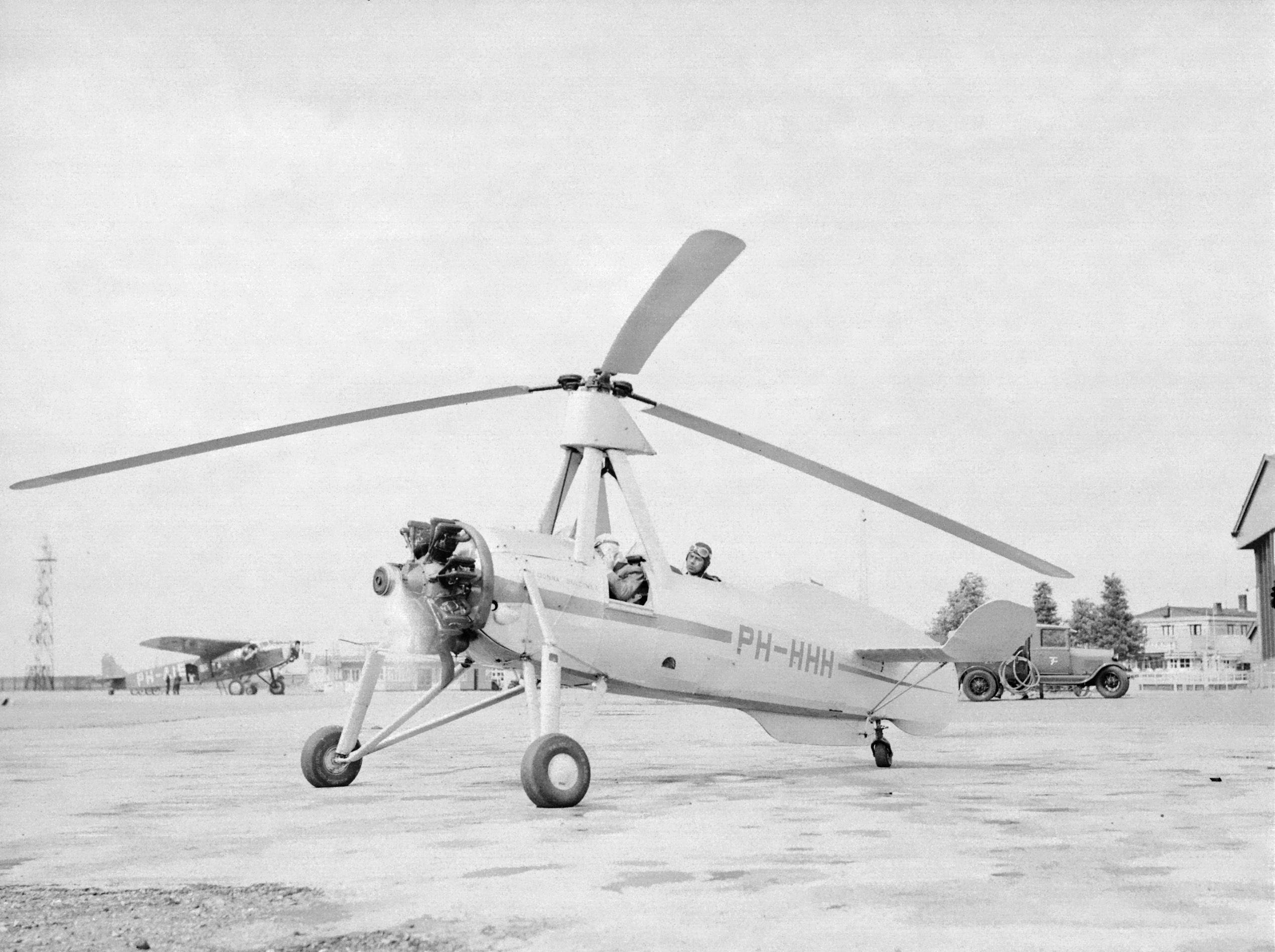 Collectie / Archief : Fotocollectie Van de Poll Reportage / Serie : Nationale Luchtvaartschool Holland Beschrijving : De Cierva autogiro PH-HHH bijgenaamd de 'Donna Dulcinea' van de Nederlandse Luchtvaartschool op het Rotterdamse vliegveld Waalhaven, eigendom van sportvlieger Jacob Mees. Het toestel was veelgevraagd voor demonstraties op luchtvaartshows Annotatie : De Nederlandse Luchtvaartschool was gevestigd in Rotterdam waalhaven en Amsterdam Schiphol Datum : 1935 Locatie : Rotterdam Trefwoorden : autogiro, bijzondere vliegtuigen, luchtvaartshows, piloten, vliegopleidingen Persoonsnaam : Cierva, Juan de Fotograaf : Poll, Willem van de Auteursrechthebbende : Nationaal Archief Materiaalsoort : Negatief (zwart/wit) Nummer archiefinventaris : bekijk toegang 2.24.14.02 Bestanddeelnummer : 255-8626